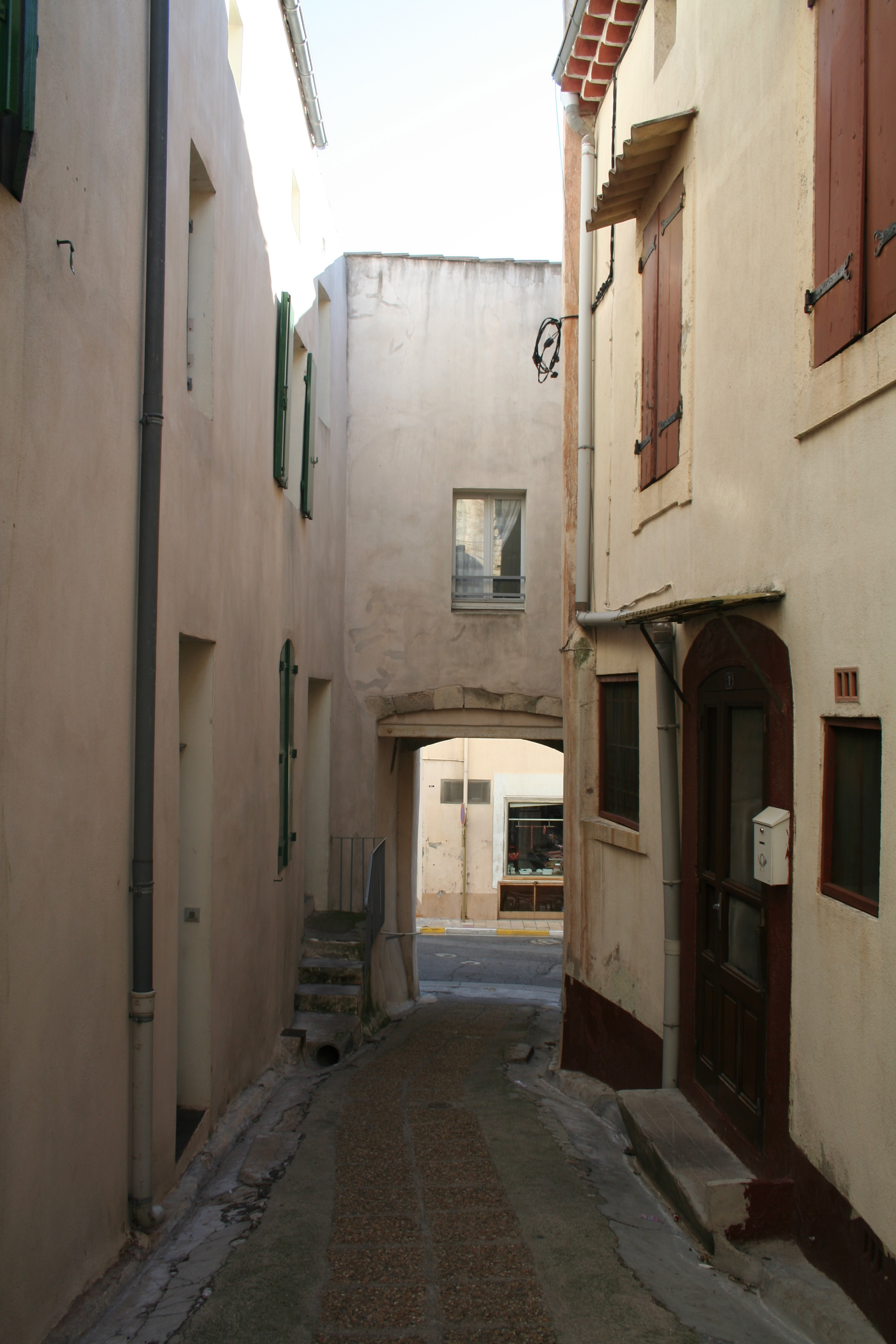 Puisserguier (Hérault) - passage.